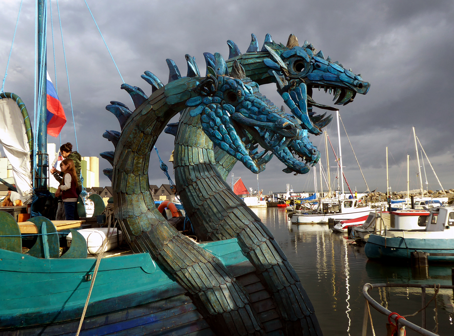 Den trehövdade draken Zmei Gorynich som enligt ryska sägner åt upp unga flickor, här i fören på ett ryskt vikingaskepp på besök i Ystad 7 juli 2019.